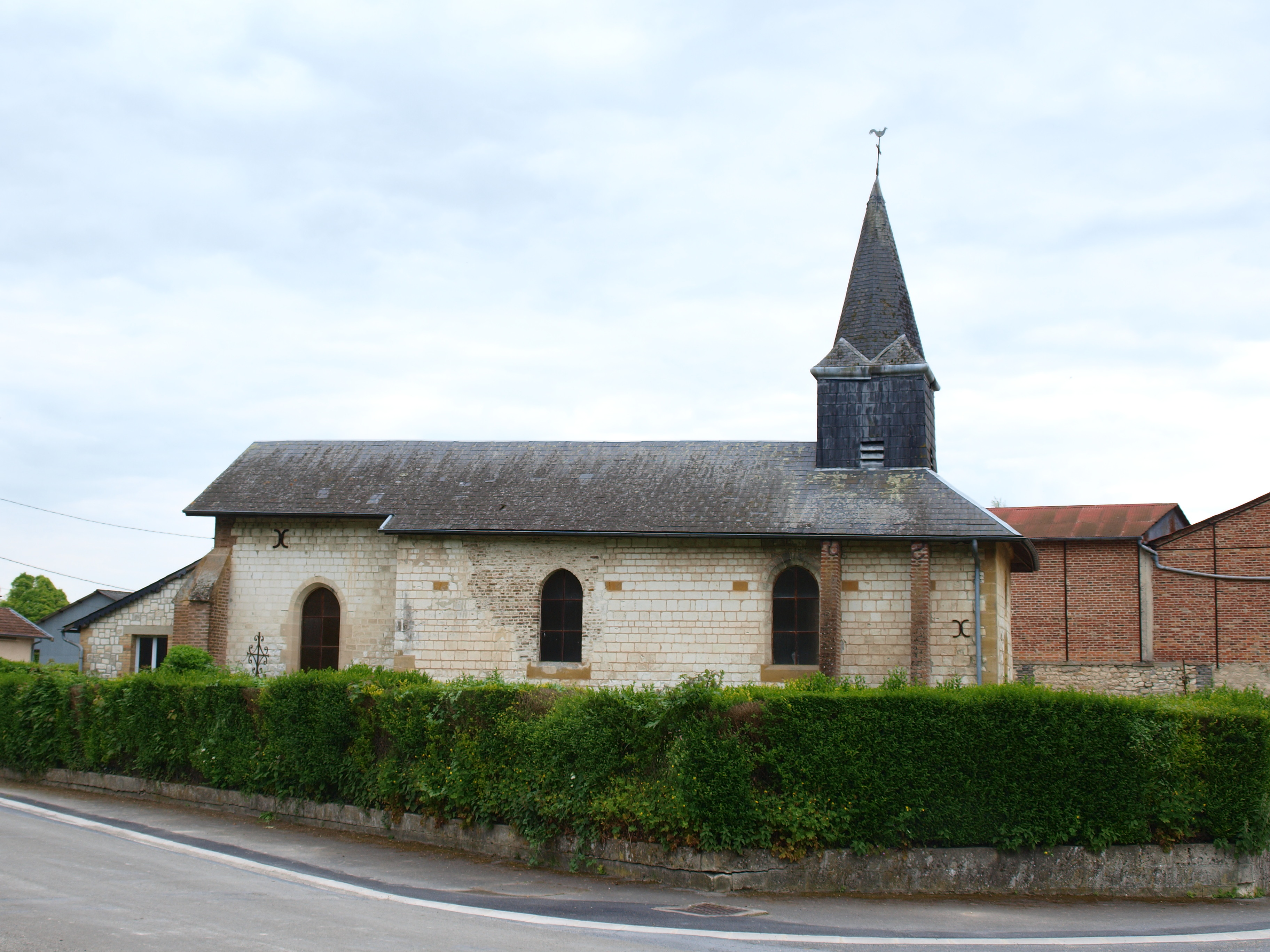 Aure (Ardennes , France) ; église